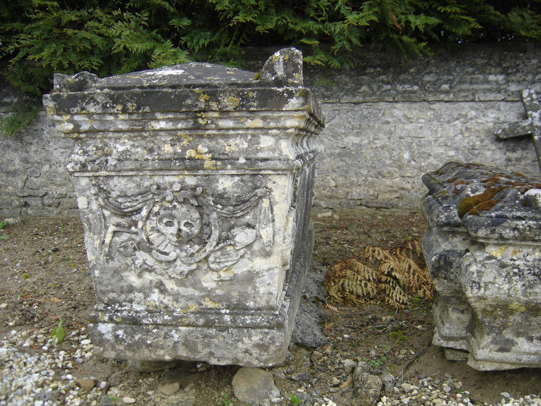 tombe de J. B. Saillenfest De Cachy, ancien garde du corps du Roi et Chevalier de Saint Louis, mort en 1821